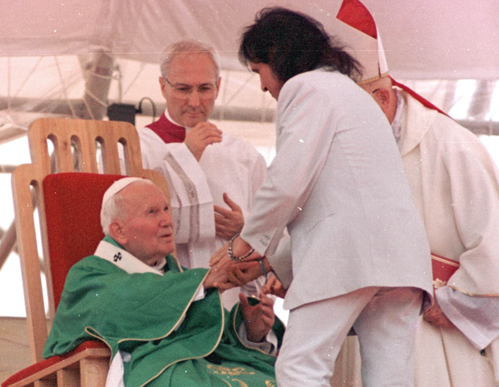 Papa João Paulo II abençoa o cantor Roberto Carlos durante missa no Aterro do Flamengo.